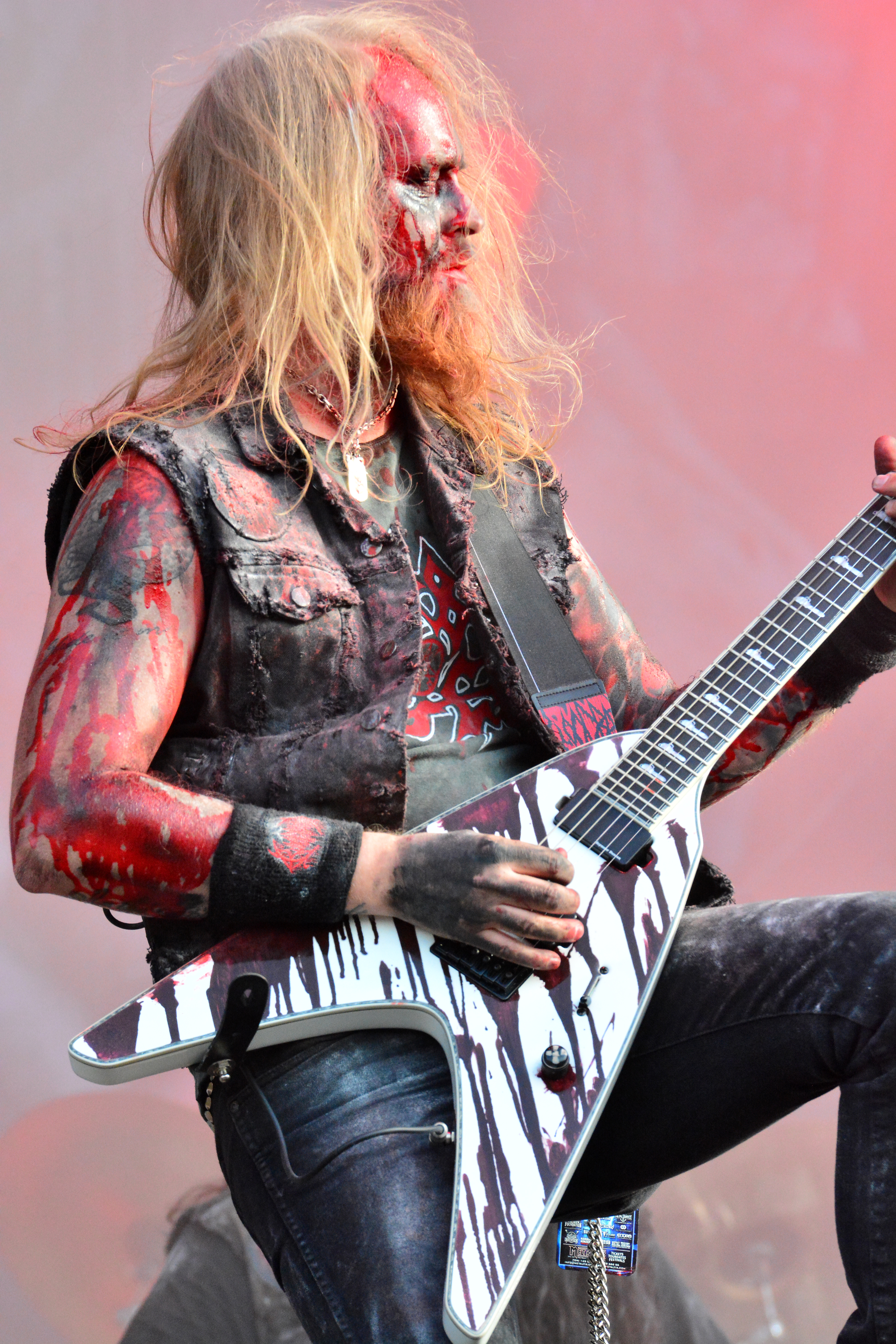 Bloodbath beim Wacken Open Air 2015